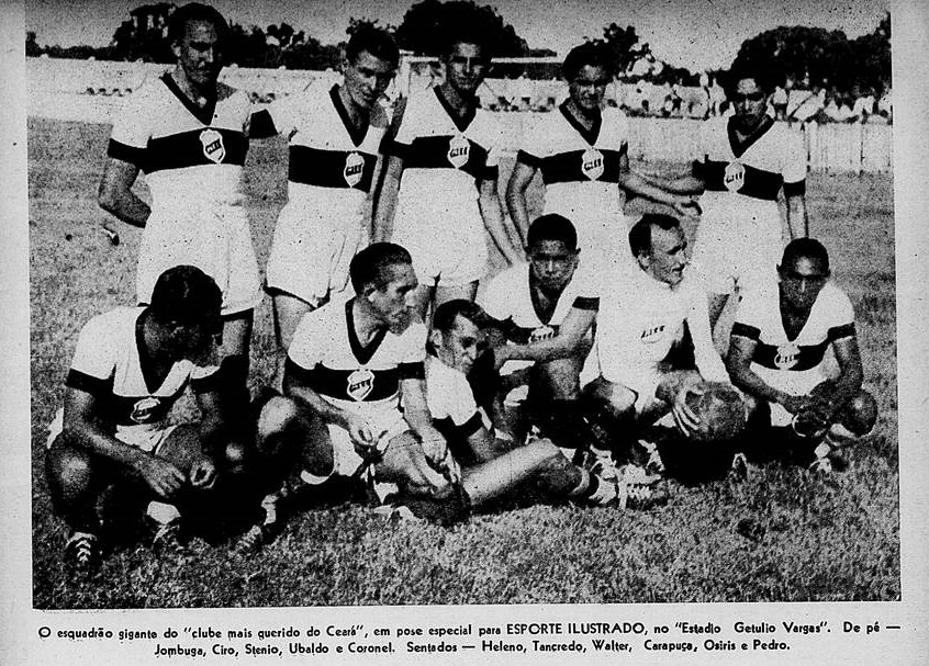 Esporte Ilustrado de Junho de 1942 - O mais querido cearense.